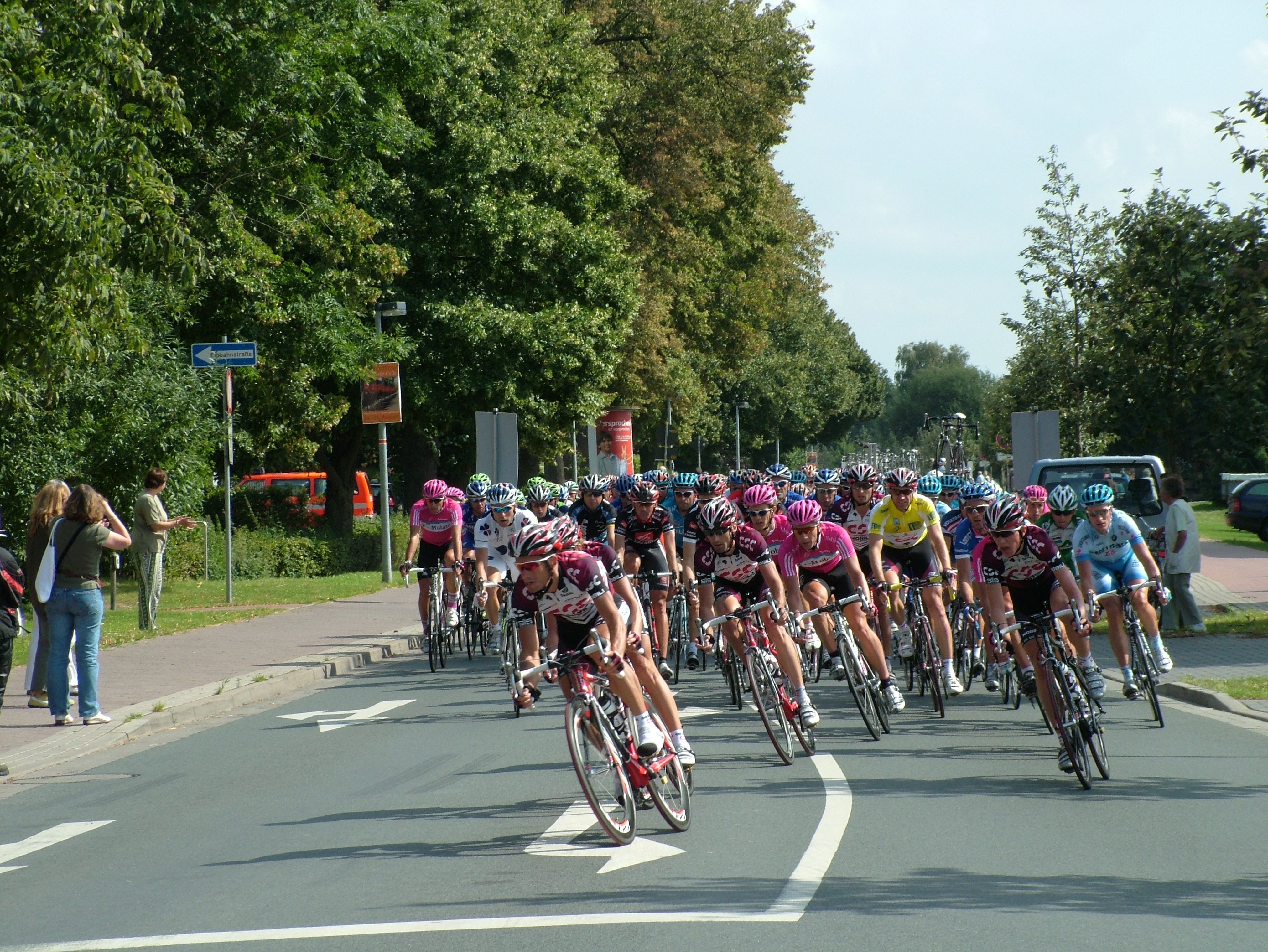 Deutschlandtour 2007, letzte Etappe, das Hauptfeld in Pattensen kurz vor der Sprintwertung